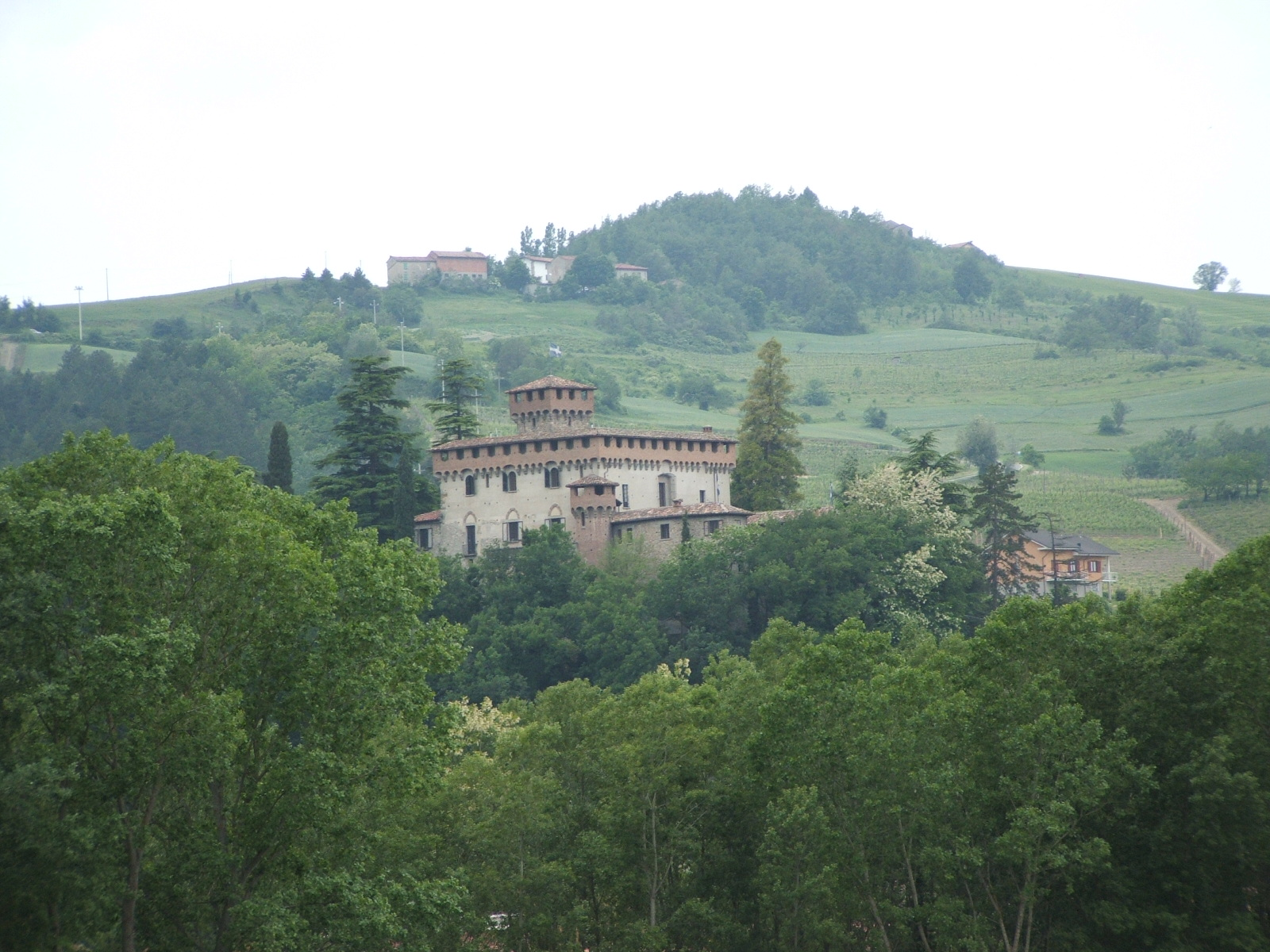 Brignano-Frascata, provincia di Alessandria - Castello Bruzzo.